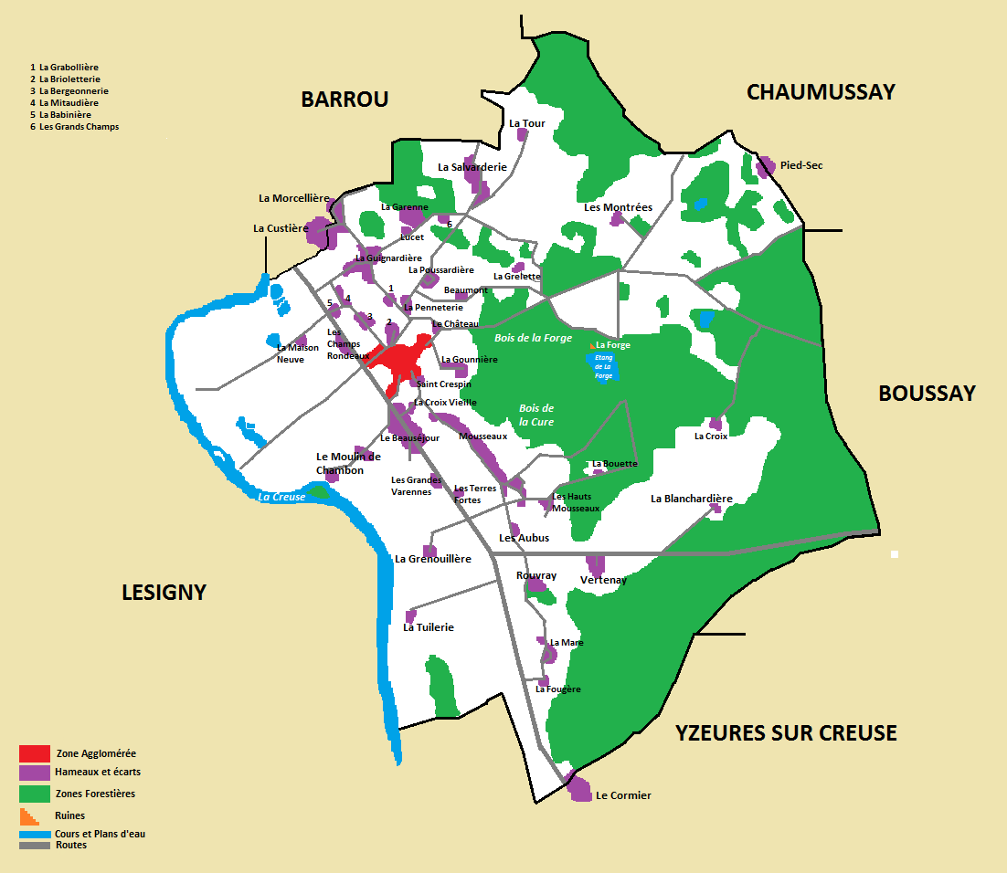 Carte de Chambon (Indre-et-Loire) et de ses hameaux